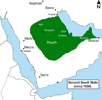 Second Saudi State